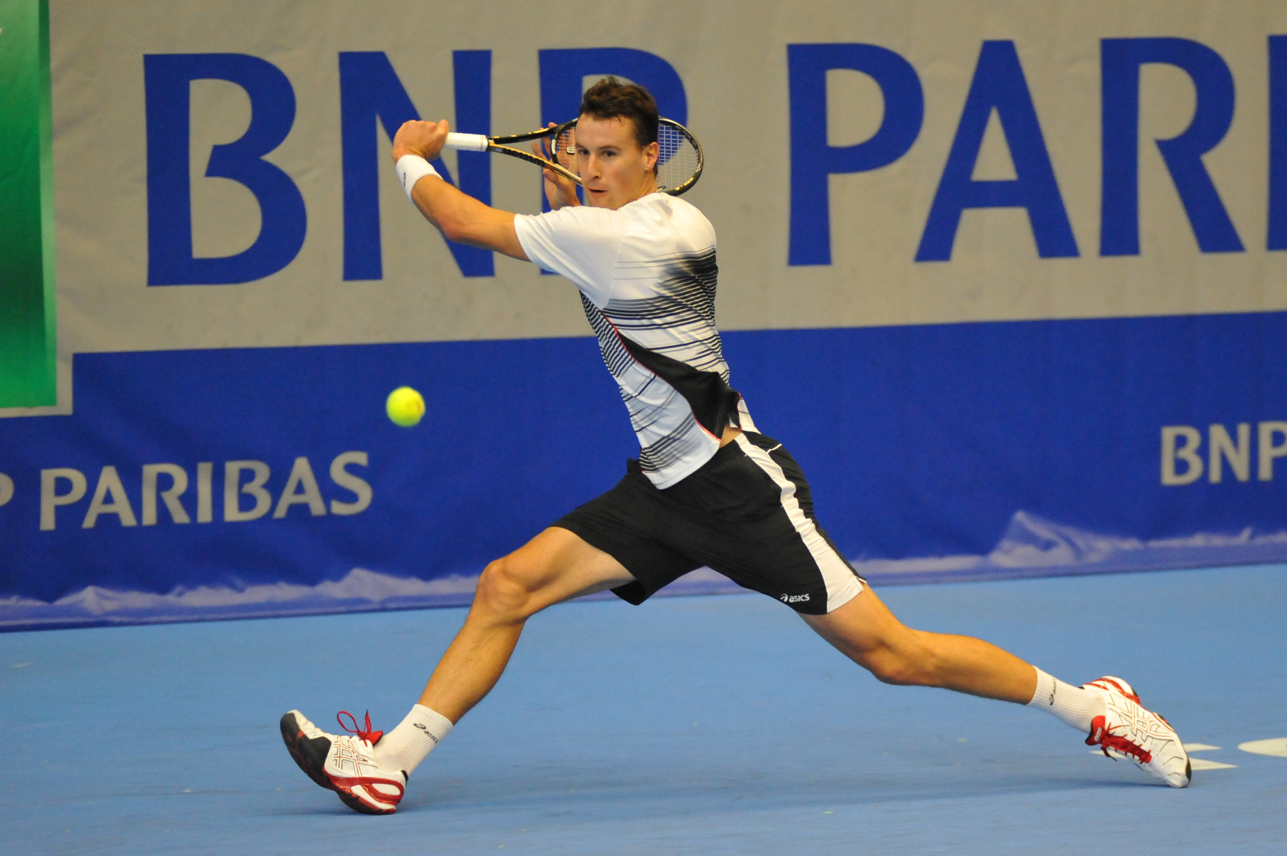 Vainqueur 2012